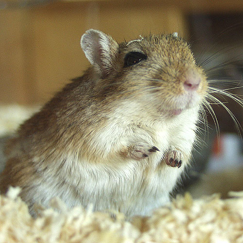 Mongolische Wüstenrennmaus